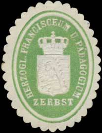 Sealing stamp Title: H. Francisceum und Pädagogium Zerbst Description: grün, weiß, geprägt Place: Zerbst size: 3x3 cm